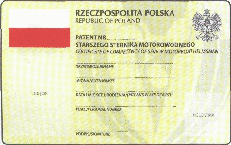 Awers patentu starszego sternika motorowodnego z 2006 roku.